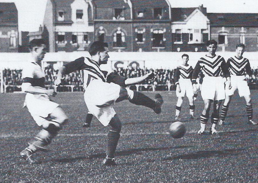 Derby lillois en septembre 1934 opposant le SC Fives à l'Olympique lillois